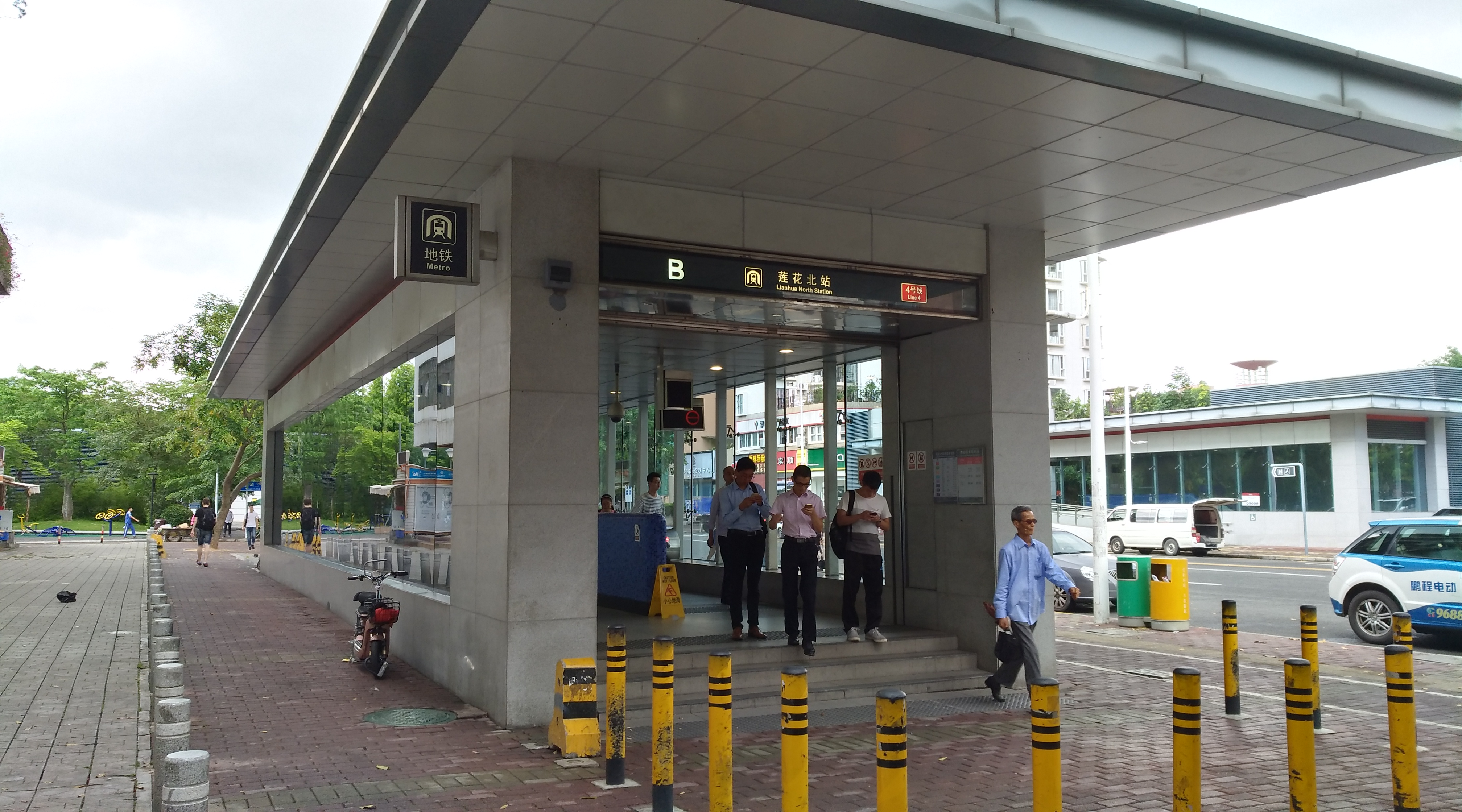 深圳地铁 4号线 莲花北站 B出口